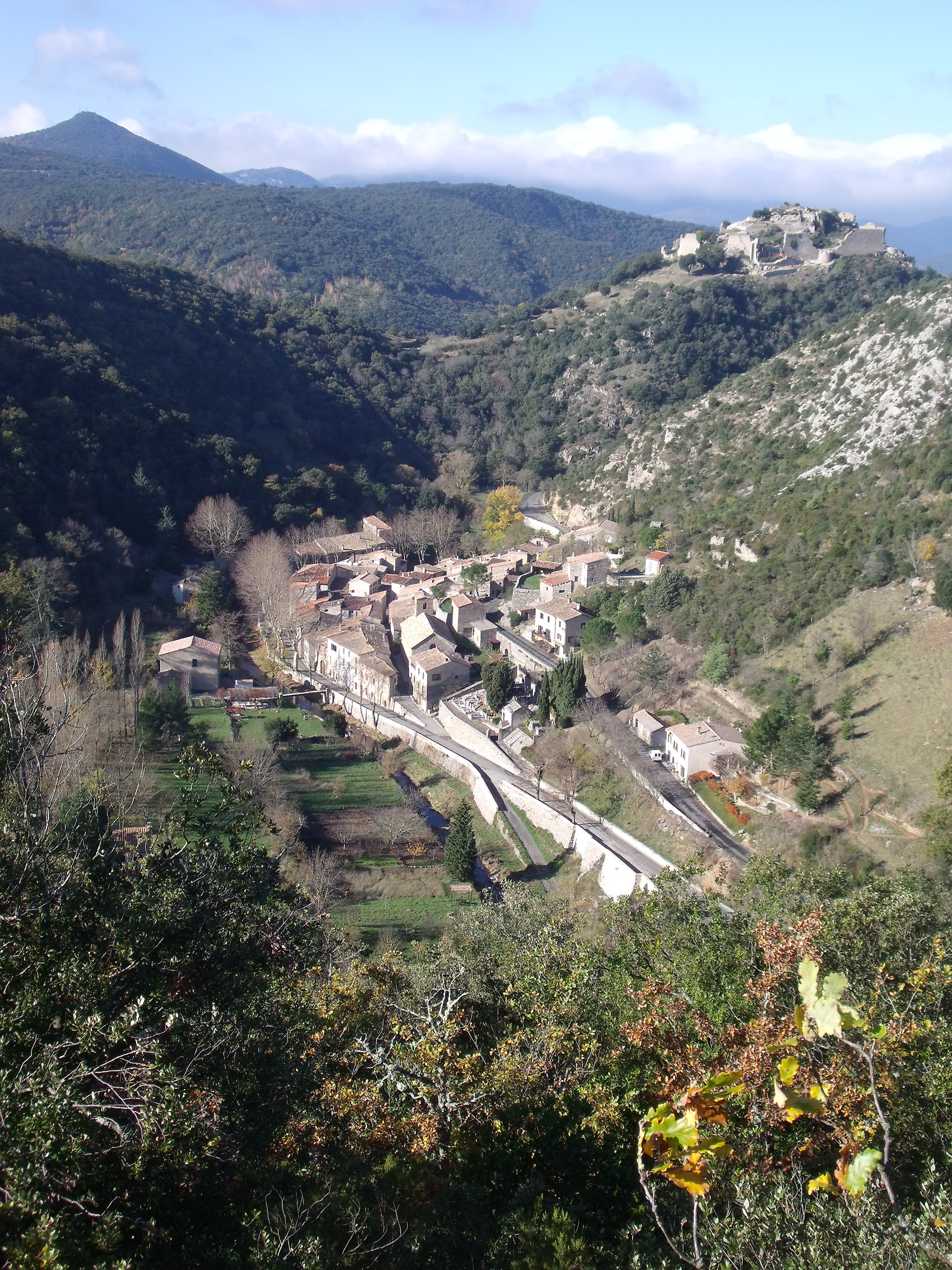 Photo du site prise 800 ans après la prise du château par les croisés de Simon de Montfort. Lumière automnale en regardant vers l'ouest. .